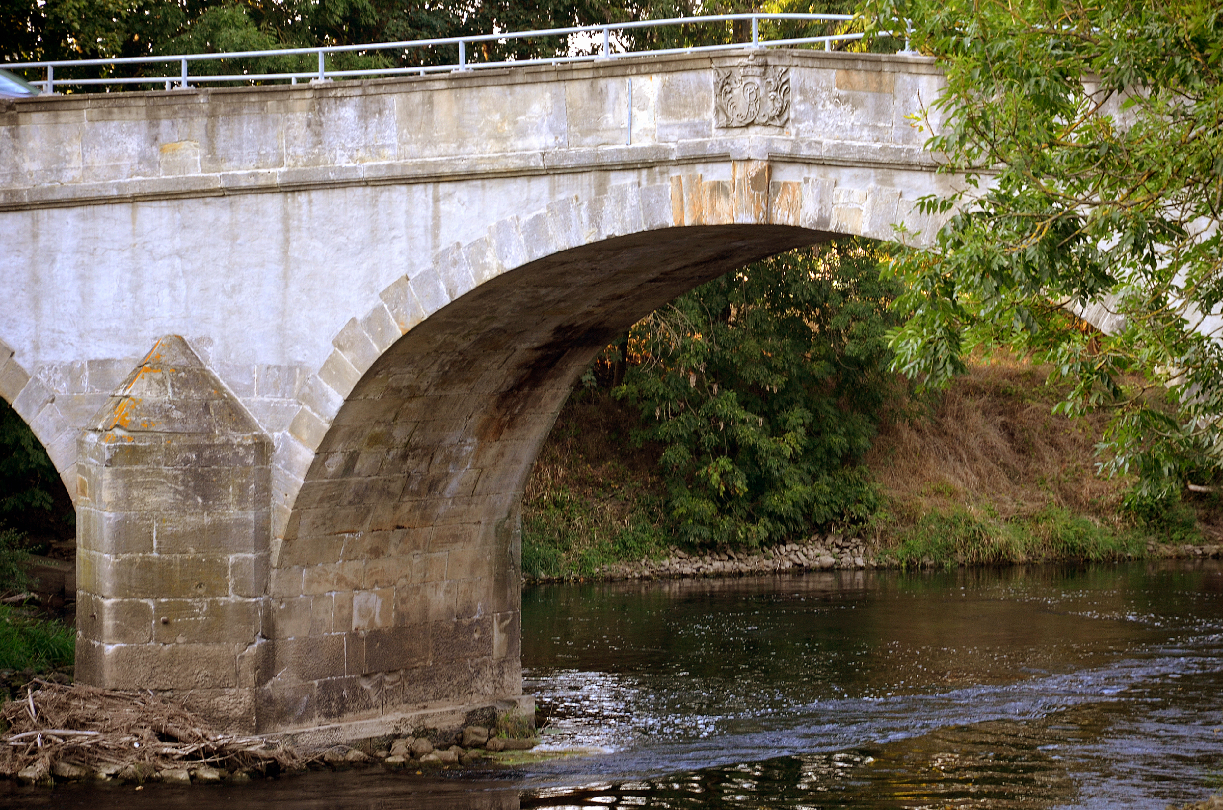 Das mittlere elliptische Joch der 1751 errichteten Calenberger Brücke über die Leine, die im Zuge der Anlage der Landstraße von Gestor bis nach Rössing bei Schulenburg enstand, trägt den Wappenstein von Kurfürst Georg II. mit den verschlungenen Initialen G R II (Georg Rex II) des Bau- und Landesherrn ...